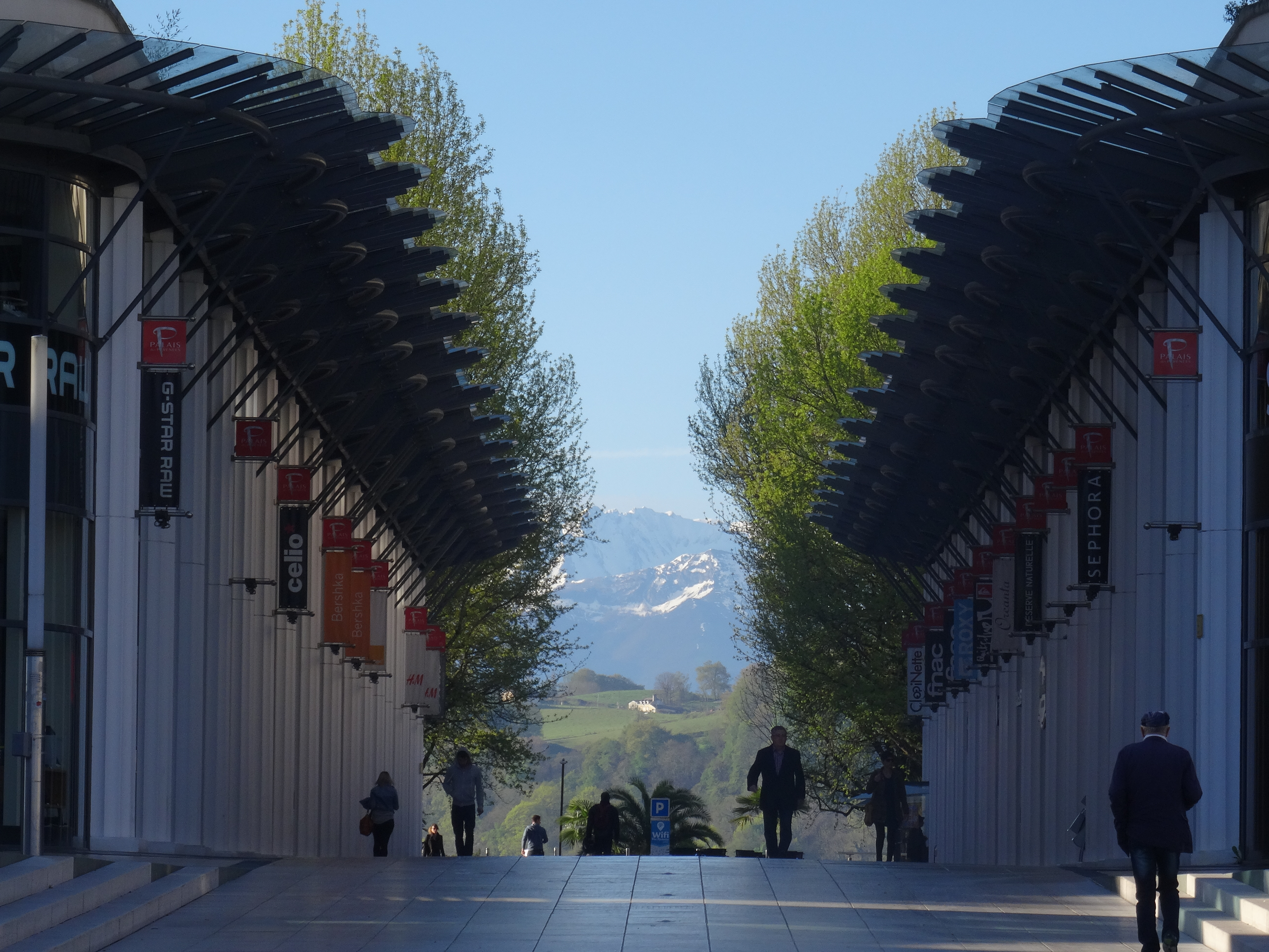 Palais des Pyrénées pris au matin